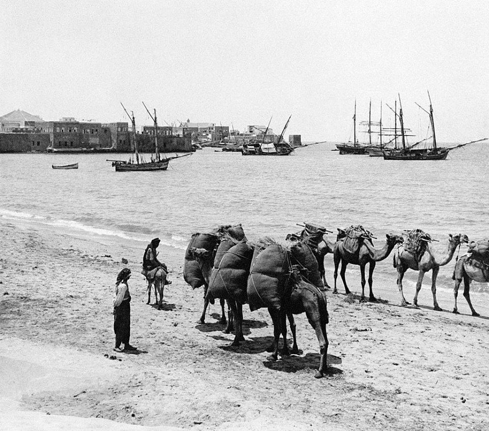 مدينة صور جنوب لبنان عام ١٩٣١